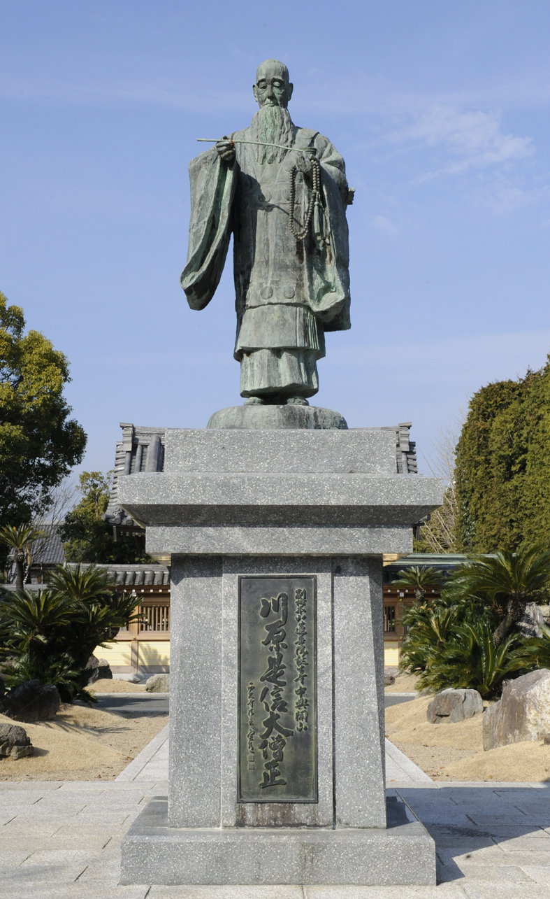 川原是信大僧正の銅像